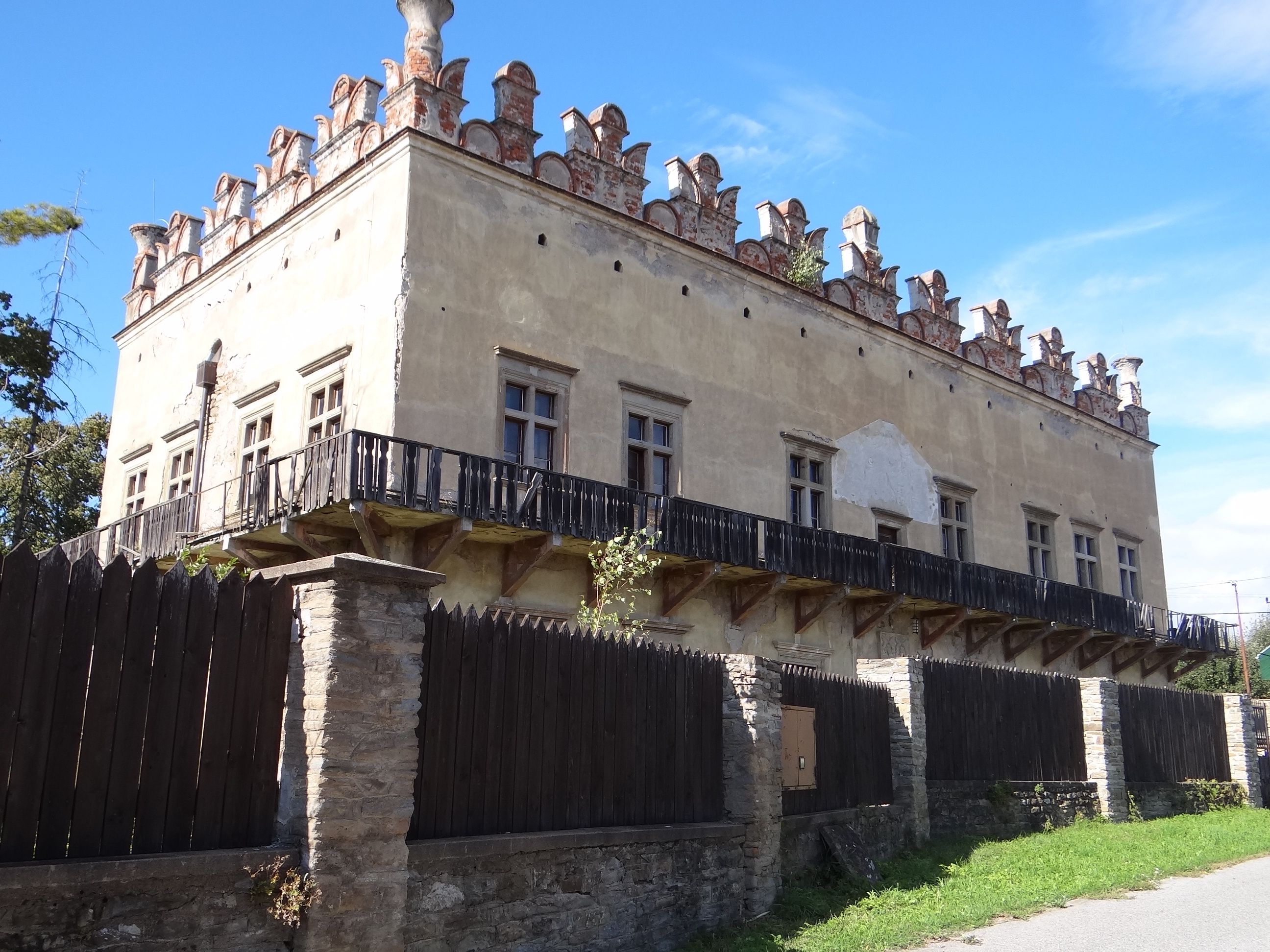 Thurzovský kaštieľ v Betlanovciach